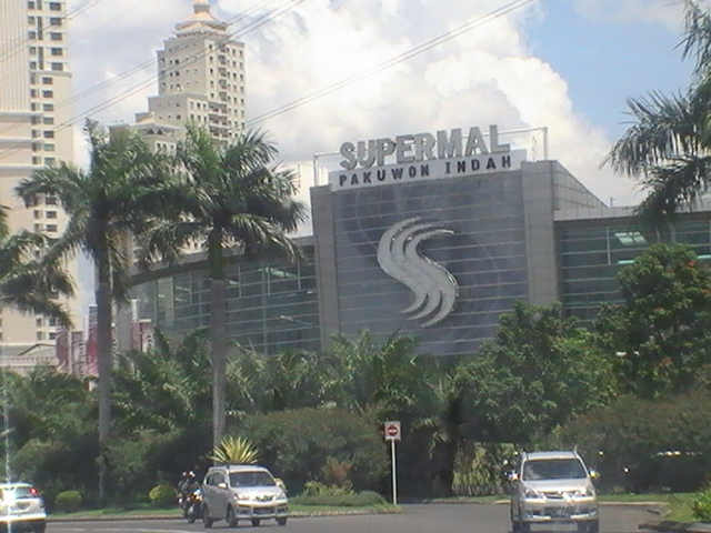 Supermal Pakuwon Indah